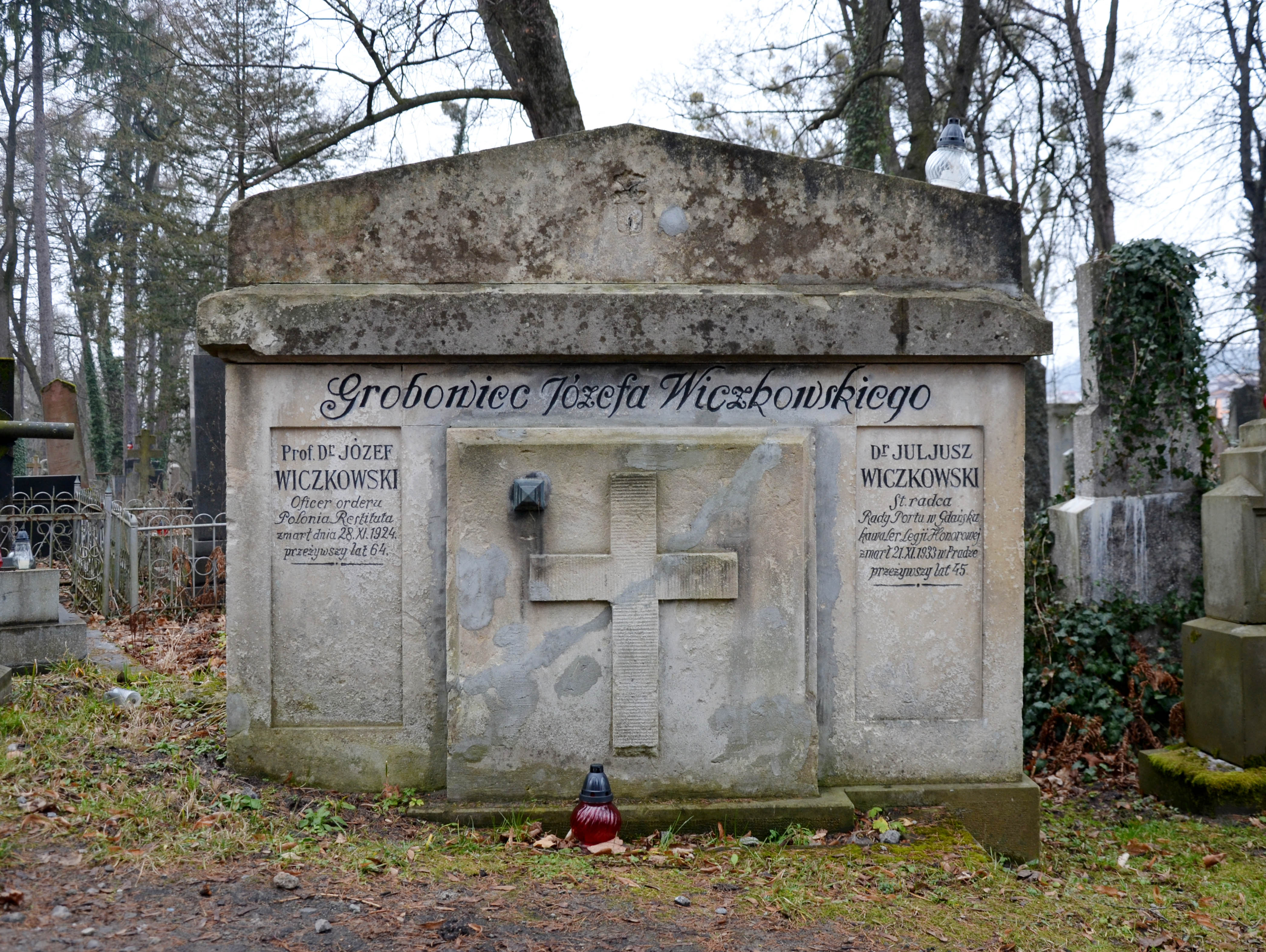 Гробівець родини Вічковських на Личаківському цвинтарі.